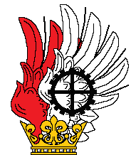 Geschlossener Flug als heraldisches Element aus dem Familienwappen des Erfinders und Unternehmers Johann Zimmermann (1820–1901), Begründers des Werkzeugmaschinenbaus in Deutschland, verliehen anlässlich seiner Erhebung in den österreichischen Ritterstand 1877. Zeichnung von Gerd Hruška (